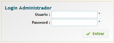 dofe